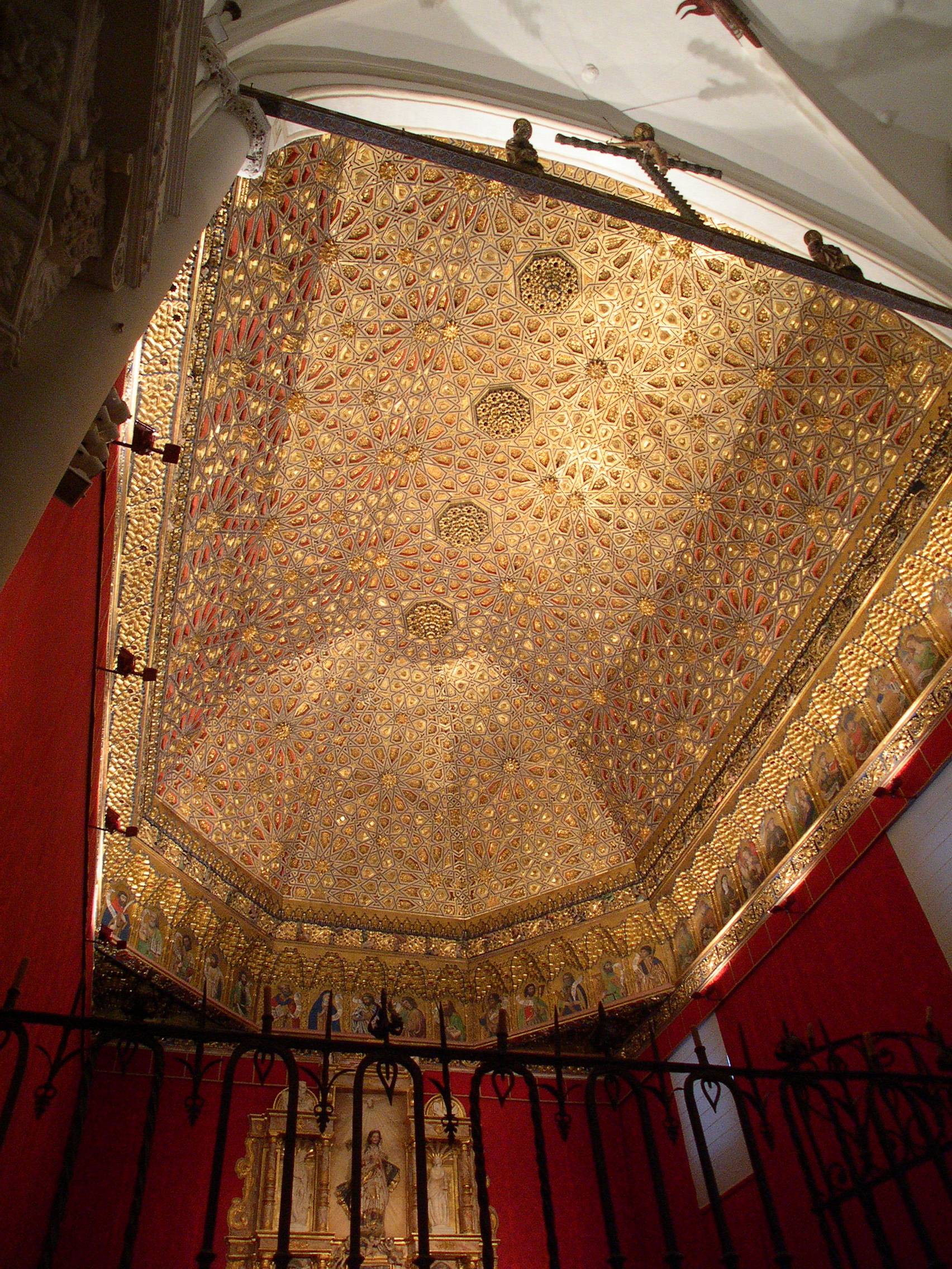 Artesonado de la capilla principal del real monasterio-palacio de Las Claras, en Tordesillas (Valladolid, España)